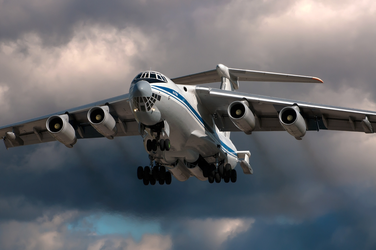 RA-78824 (cn 1003497947)